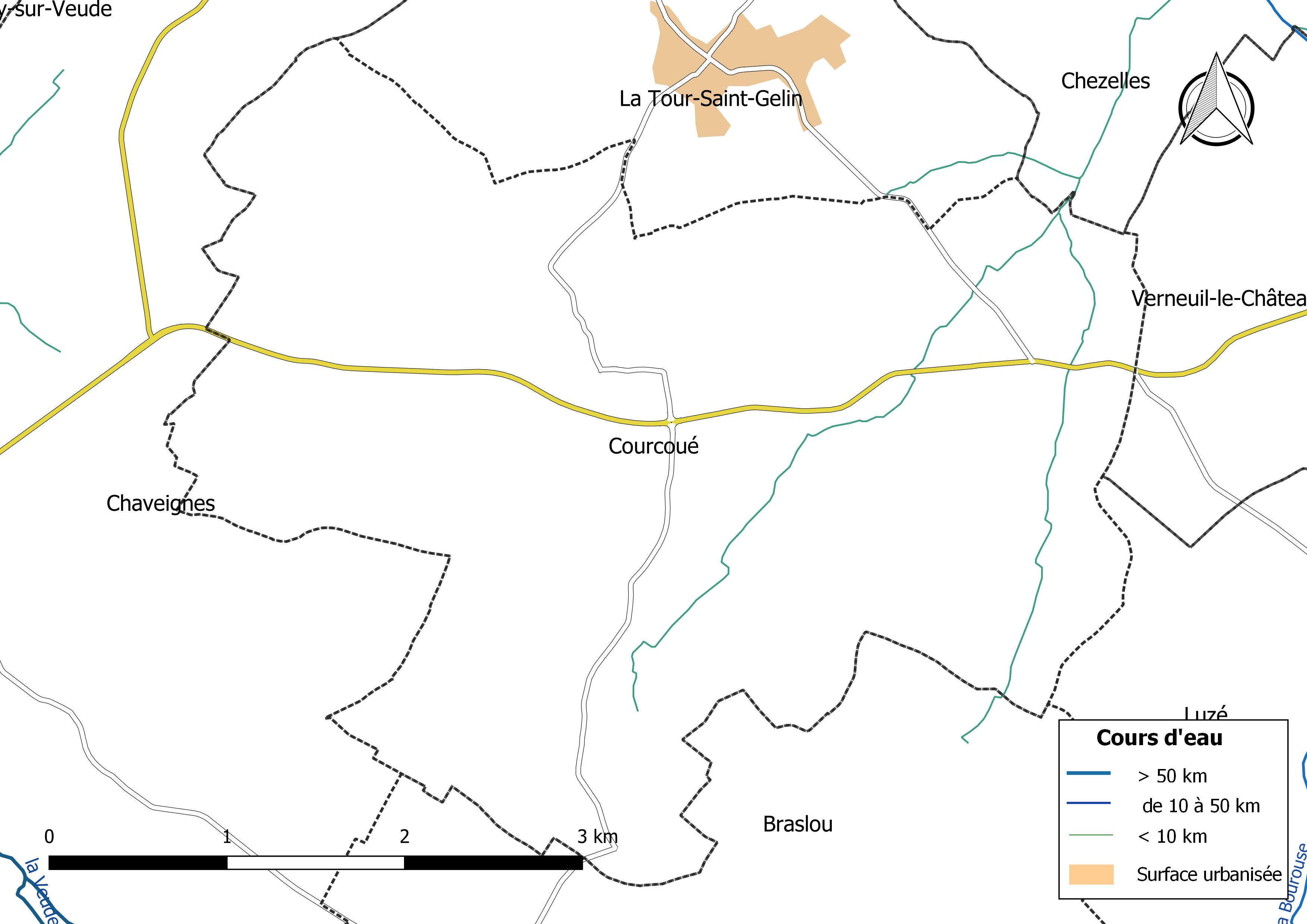 Carte du réseau hydrographique de la commune de Courcoué (France).